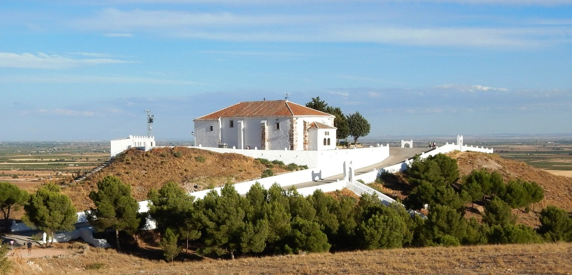 Cerro de la Virgen de Criptana, situado dentro del término municipal de Campo de Criptana (Ciudad Real)